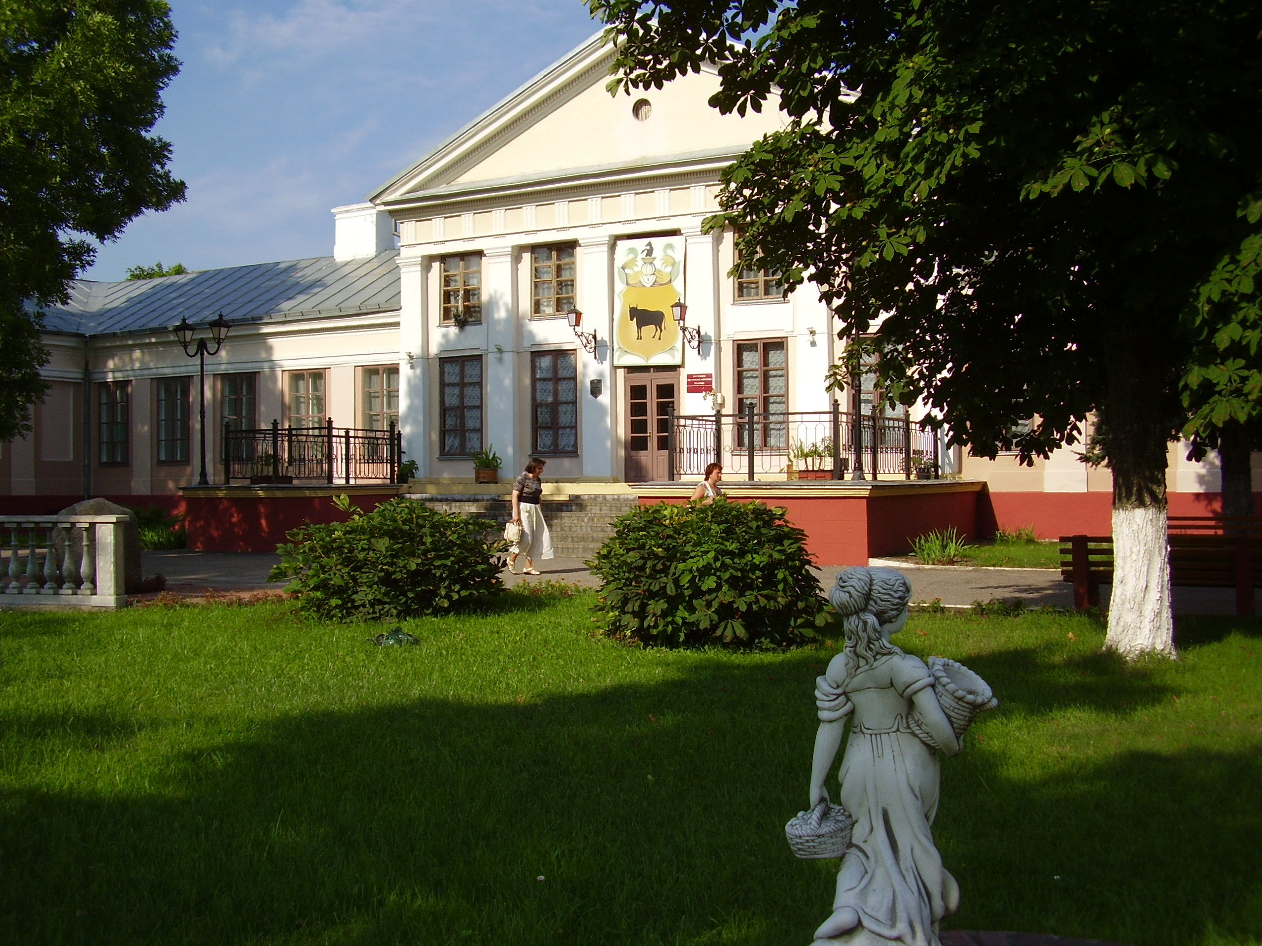 Беларуская (тарашкевіца): Будынак былога палаца Тызэнгаўзаў. г. Паставы